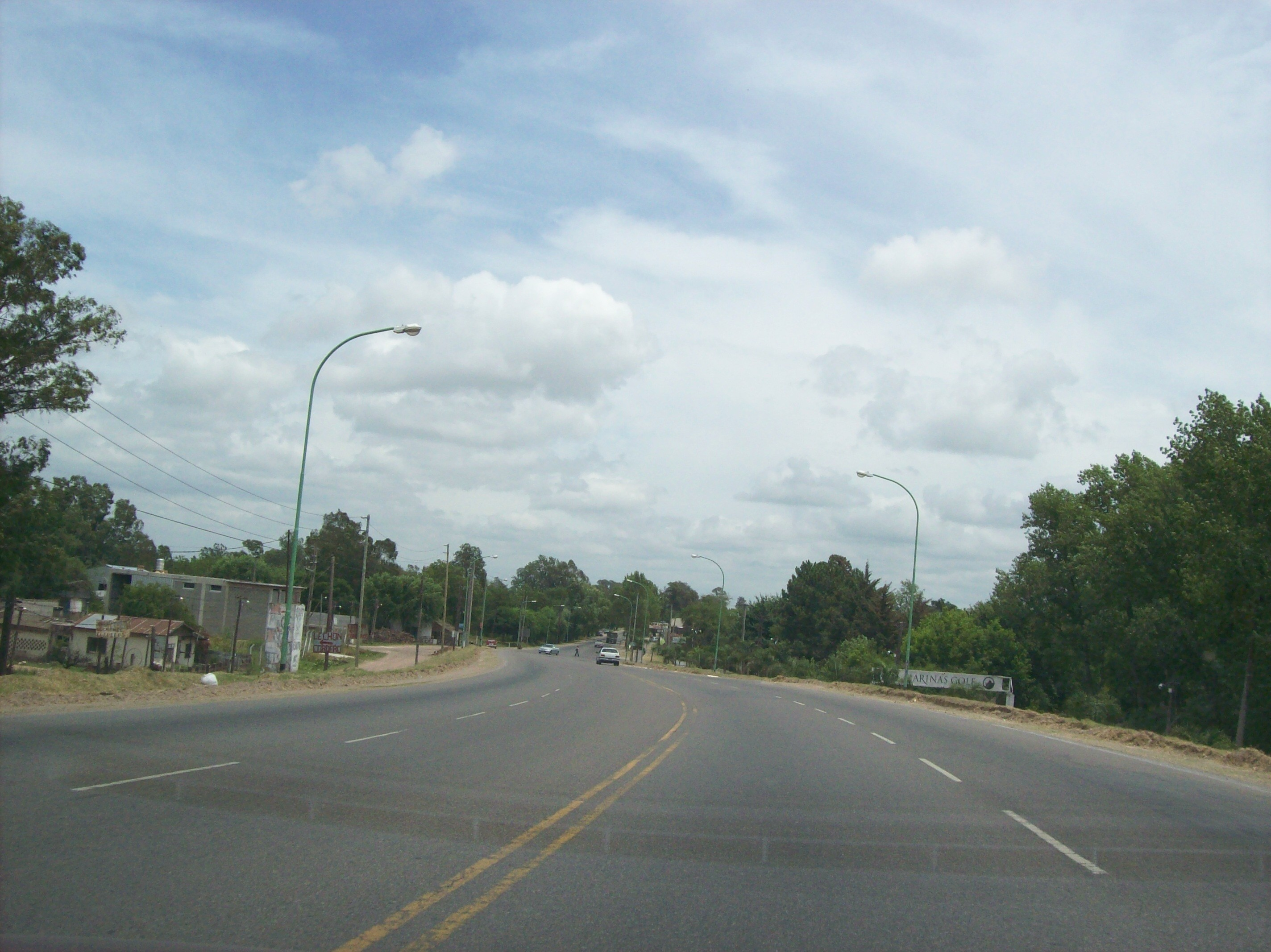 Ruta Provincial 27 en Rincón de Milberg, Gran Buenos Aires, Argentina.